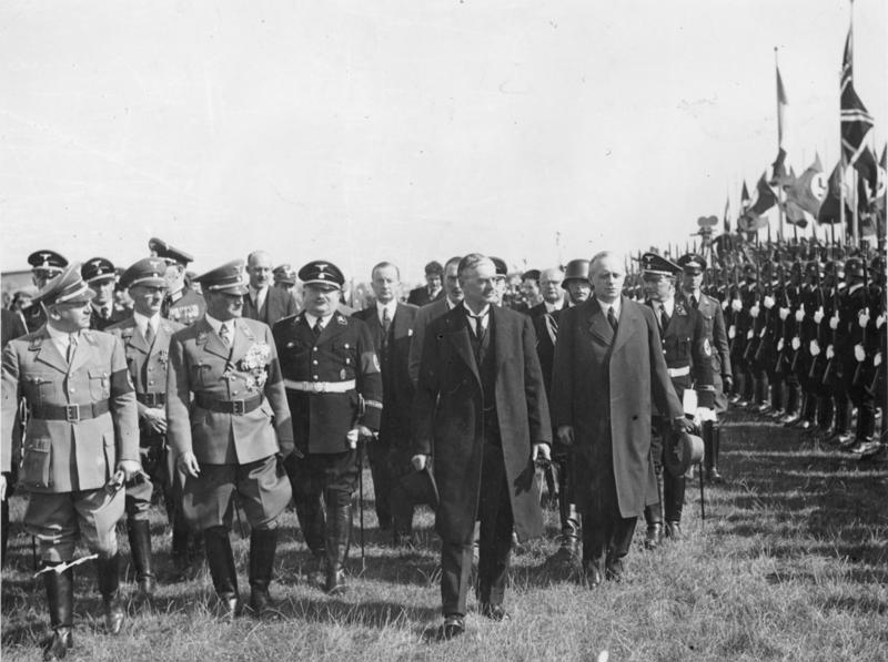 Scherl: Die Landung des englischen Premierministers Chamberlain auf dem Münchener Flugplatz Oberwiesenfeld. Von links nach rechts: Gauleiter Adolf Wagner, Oberbürgermeister Fiehler, Reichsstatthalter Ritter von Epp, ferner der britische Botschafter in Berlin Henderson, Premierminister Chamberlain, Reichsaussenminister von Ribbentrop. II. Text ADN-Zentralbild/Archiv Münchener Abkommen 29.9.1938 Der britische Ministerpräsident Neville Chamberlain (Mitte) nach der Landung auf dem Münchener Flugplatz Oberwiesenfeld. Von links nach rechts: Gauleiter Adolf Wagner, Oberbürgermeister Fiehler, Reichsstatthalter Ritter von Epp, der britische Botschafter in Berlin, Henderson, Premierminister Chamberlain und Reichsaußenminister von Ribbentrop.